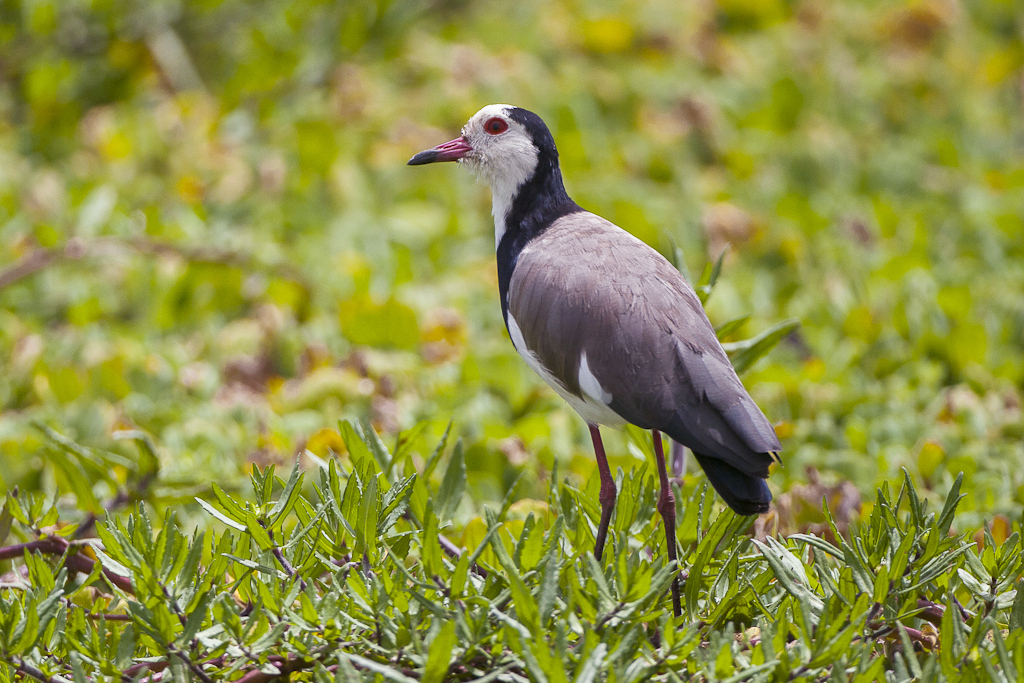 Long-toed Lapwing - Mara - KenyaIMG_4271